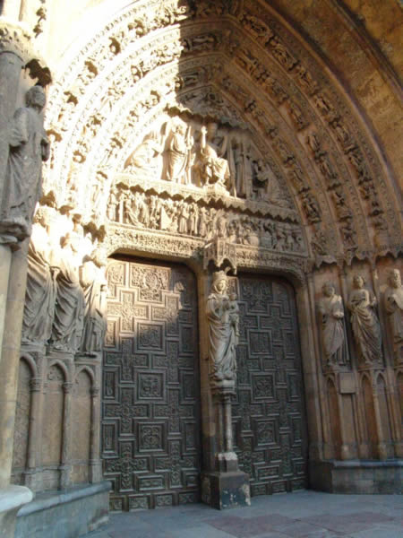 Portada de la Virgen Blanca, catedral de León